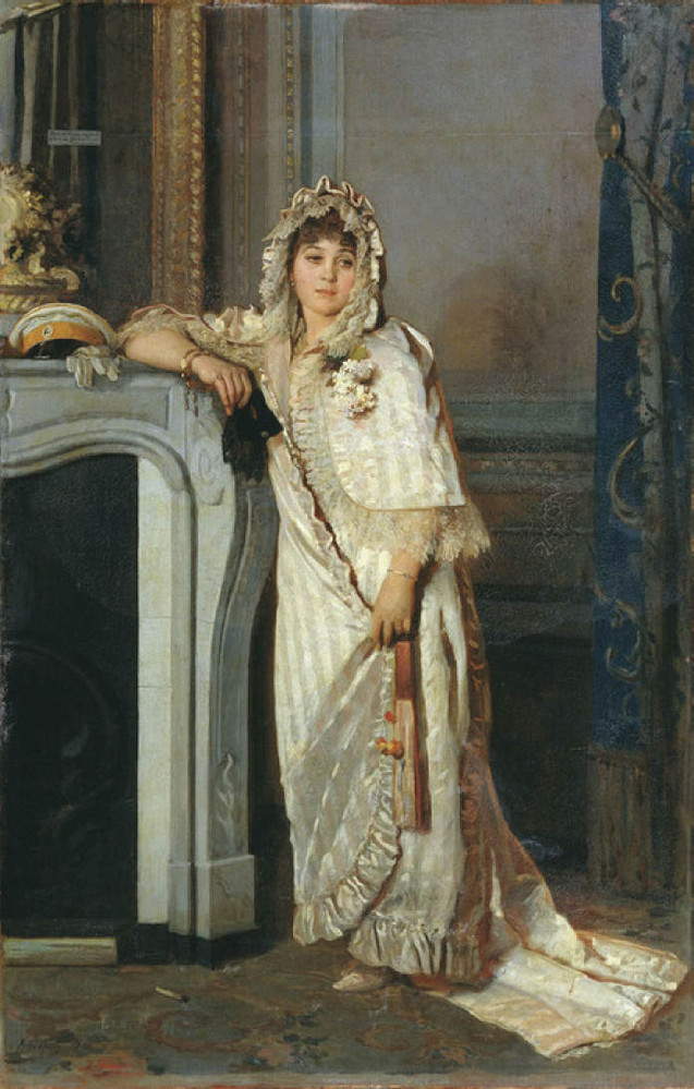 У камина